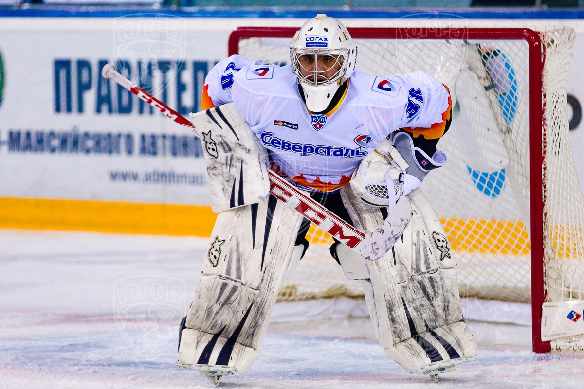 11.01.2016 Югра - Северсталь